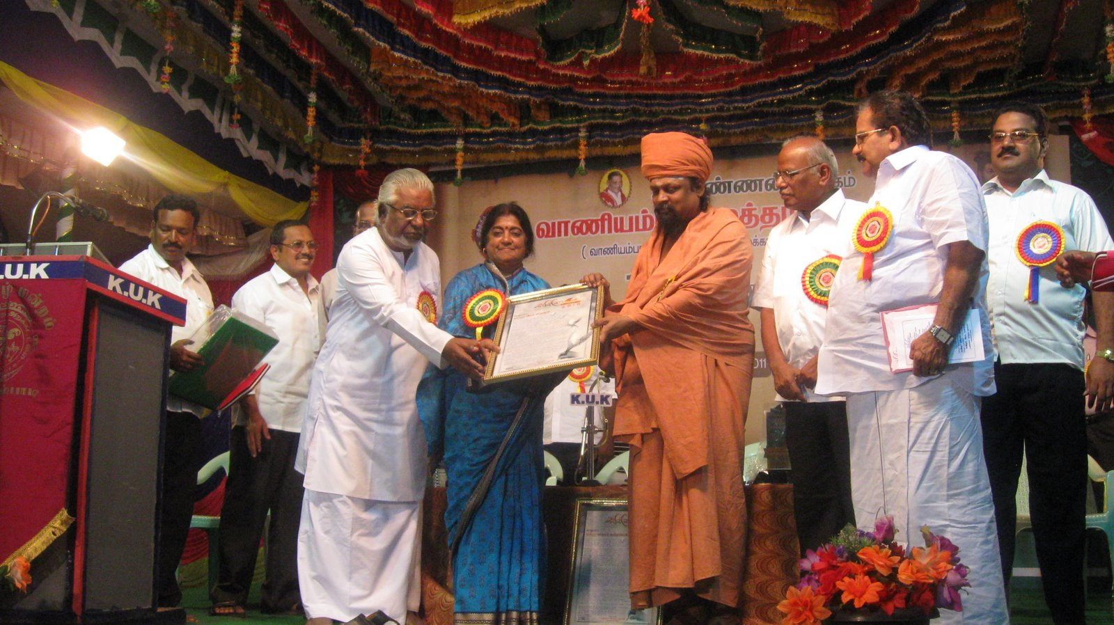 கவிஞர் அப்துல் ரஹ்மான் வழங்கும் கவிக்கோ விருதைத் தவத்திரு குன்றக்குடி பொன்னம்பல அடிகளாரிடமிருந்து (2010௦) பெறுபவர் கவிஞர் இரா. மீனாட்சி. உடன் கவிஞர் சிற்பி பாலசுப்ரமணியம்